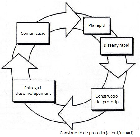 Construccio del prototip en enginyeria del software